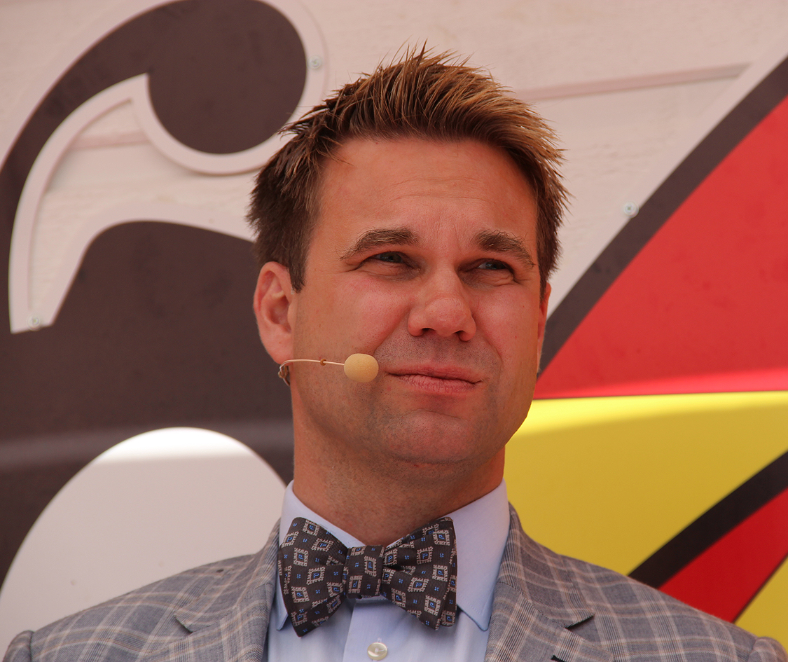 TV4:s Anders Pihlblad under Almedalsveckan 2013.